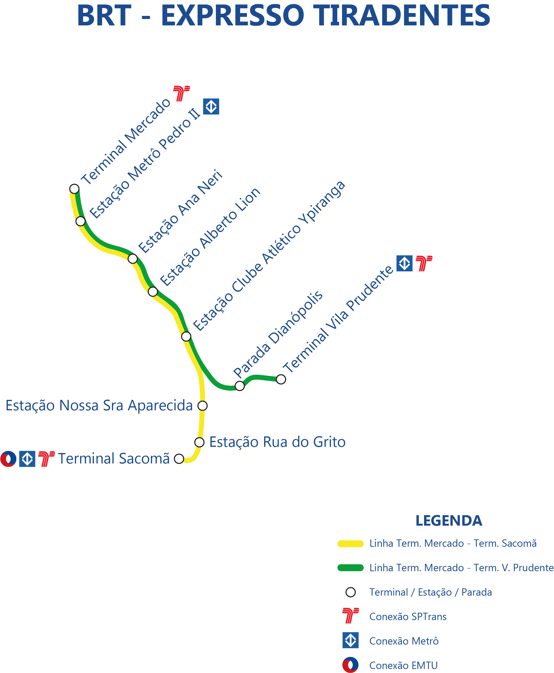 Mapa do BRT Expresso Tiradentes em abril de 2018.